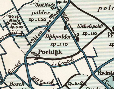 Dijkpolder